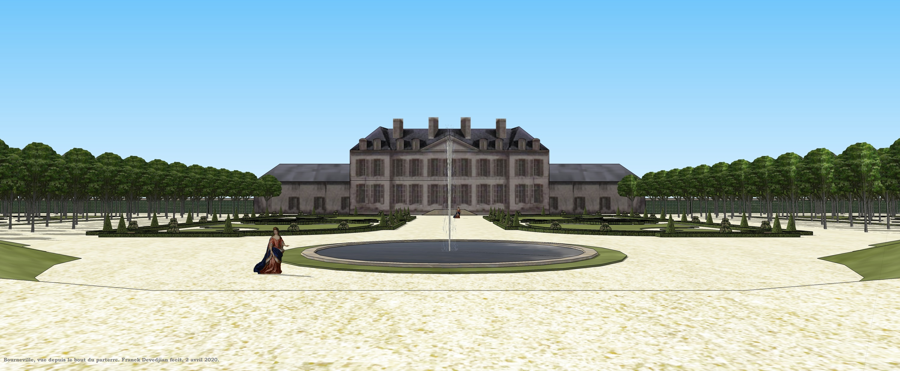 Restitution du château de Bourneville, XVIIIe siècle.